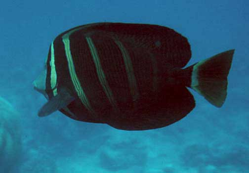 Zebrasoma veliferum